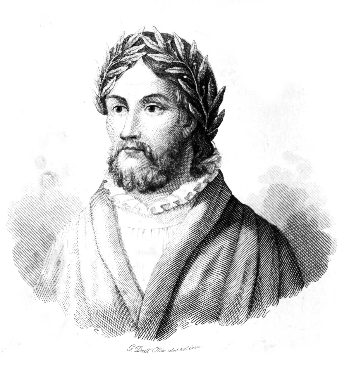 Fausto Andrelini